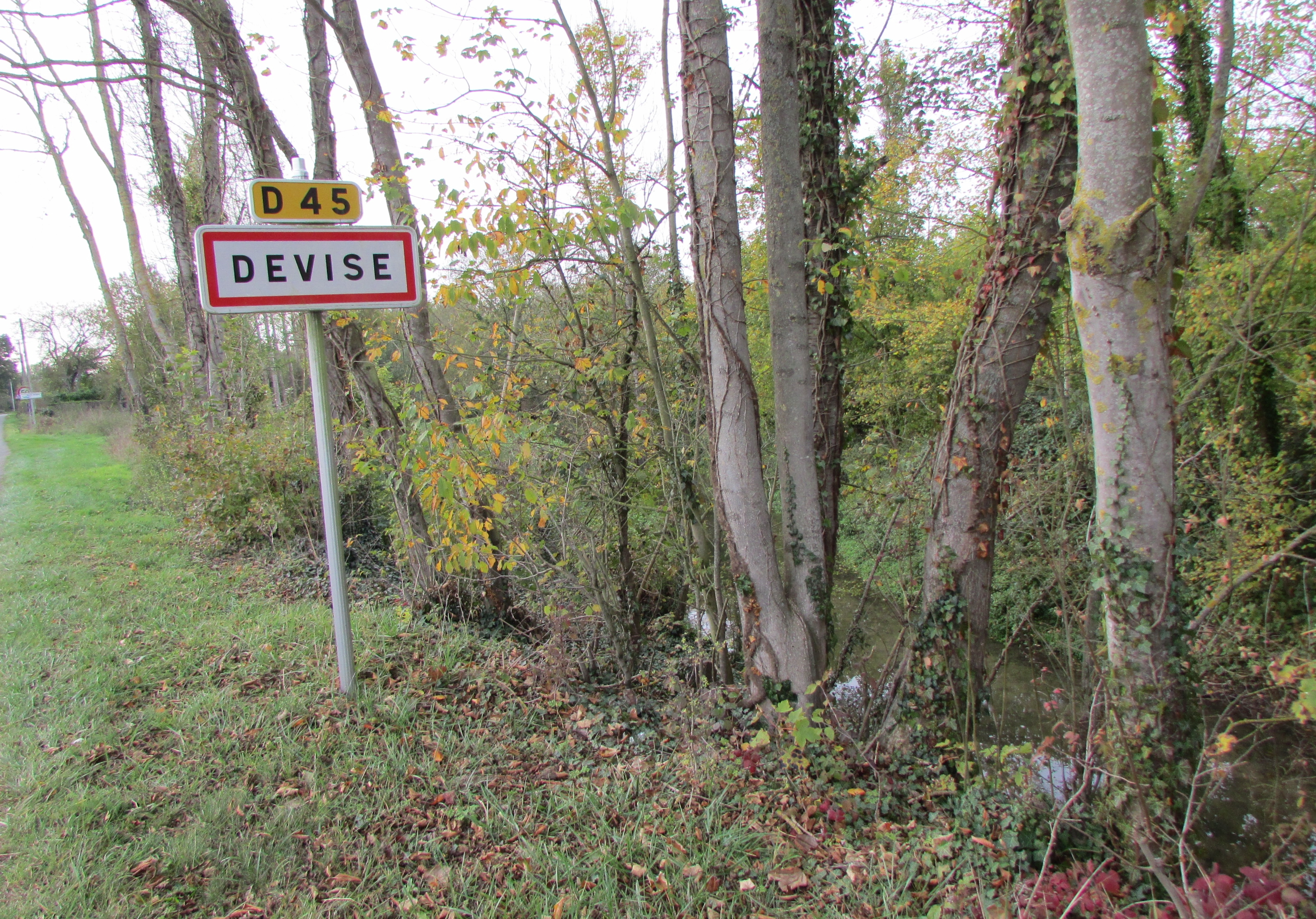 L'entré du village et l'Omignon.